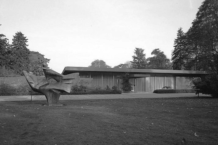 Bundeskanzleramt- Kanzlerbungalow